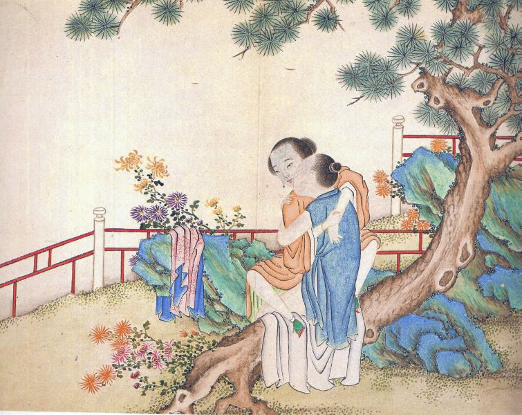 中文（香港）: 清代春宮圖